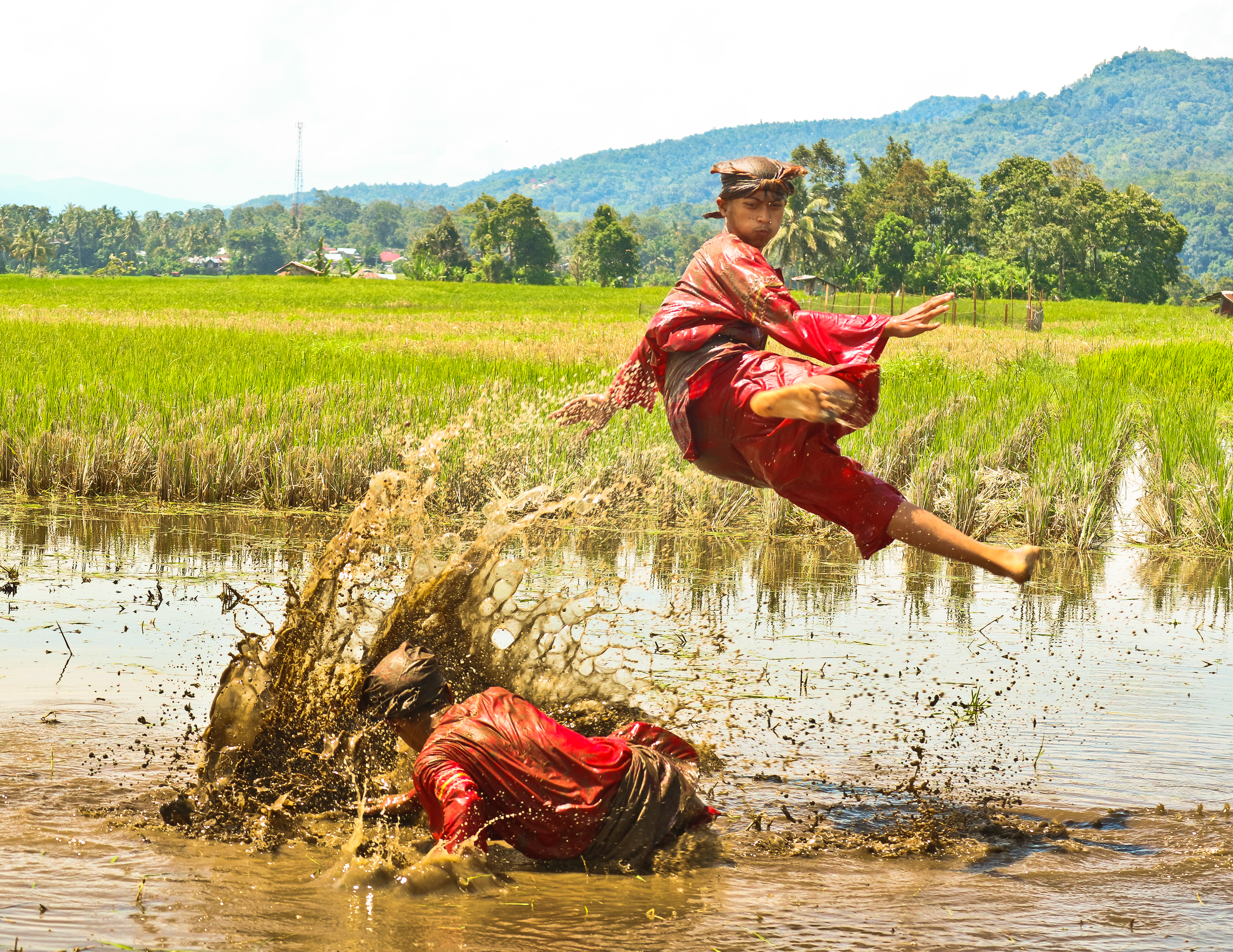 seni olahraga bela diri yang tumbuh dan berkembang di wilayah Minangkabau sejak ratusan tahun yang laludan digelar di area persawahan dan bertujuan sebagai ungkapan syukur atas hasil panen yang mereka dapatkan. This photo has been taken in the country: Indonesia